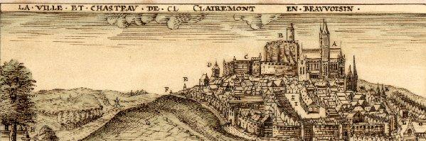 gravure de clermont de l'oise au moyen-age